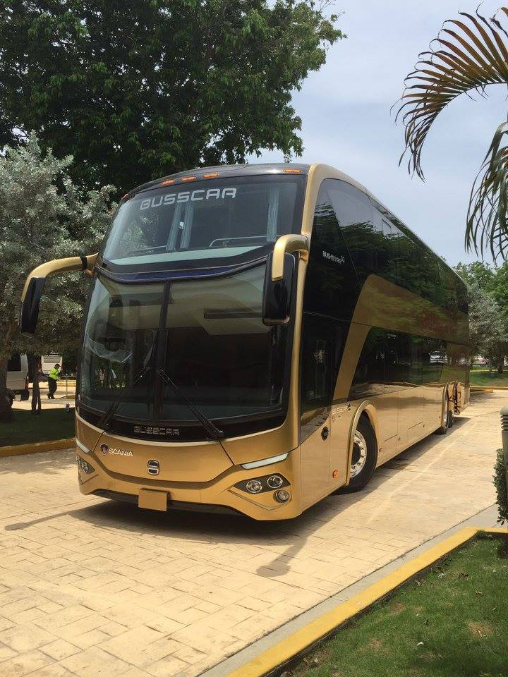 El nuevo BusStar DD S1 sucesor del BusStar DD